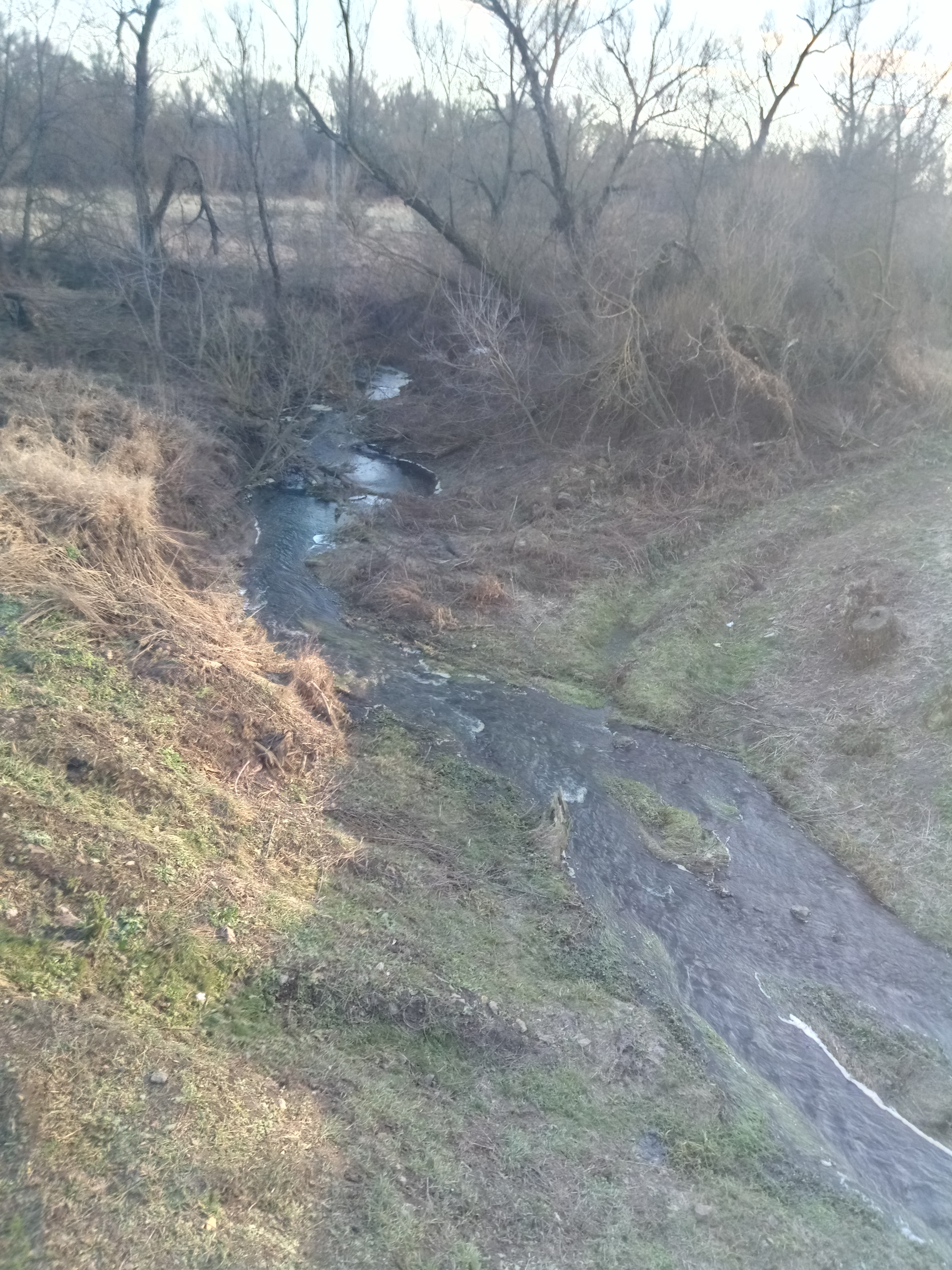 Погарщина (приток Речицы)